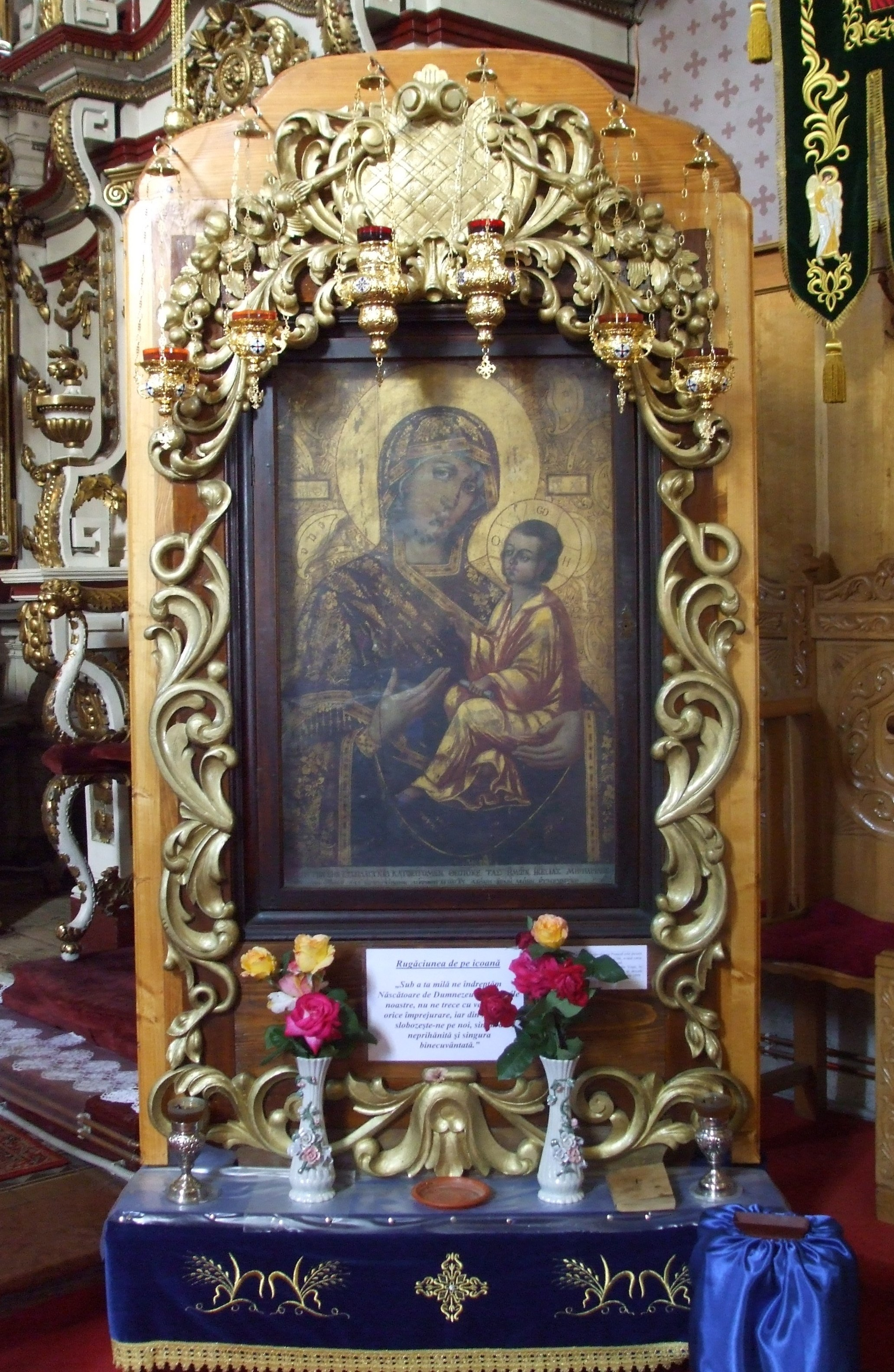 DSCF523, 1.3 MB